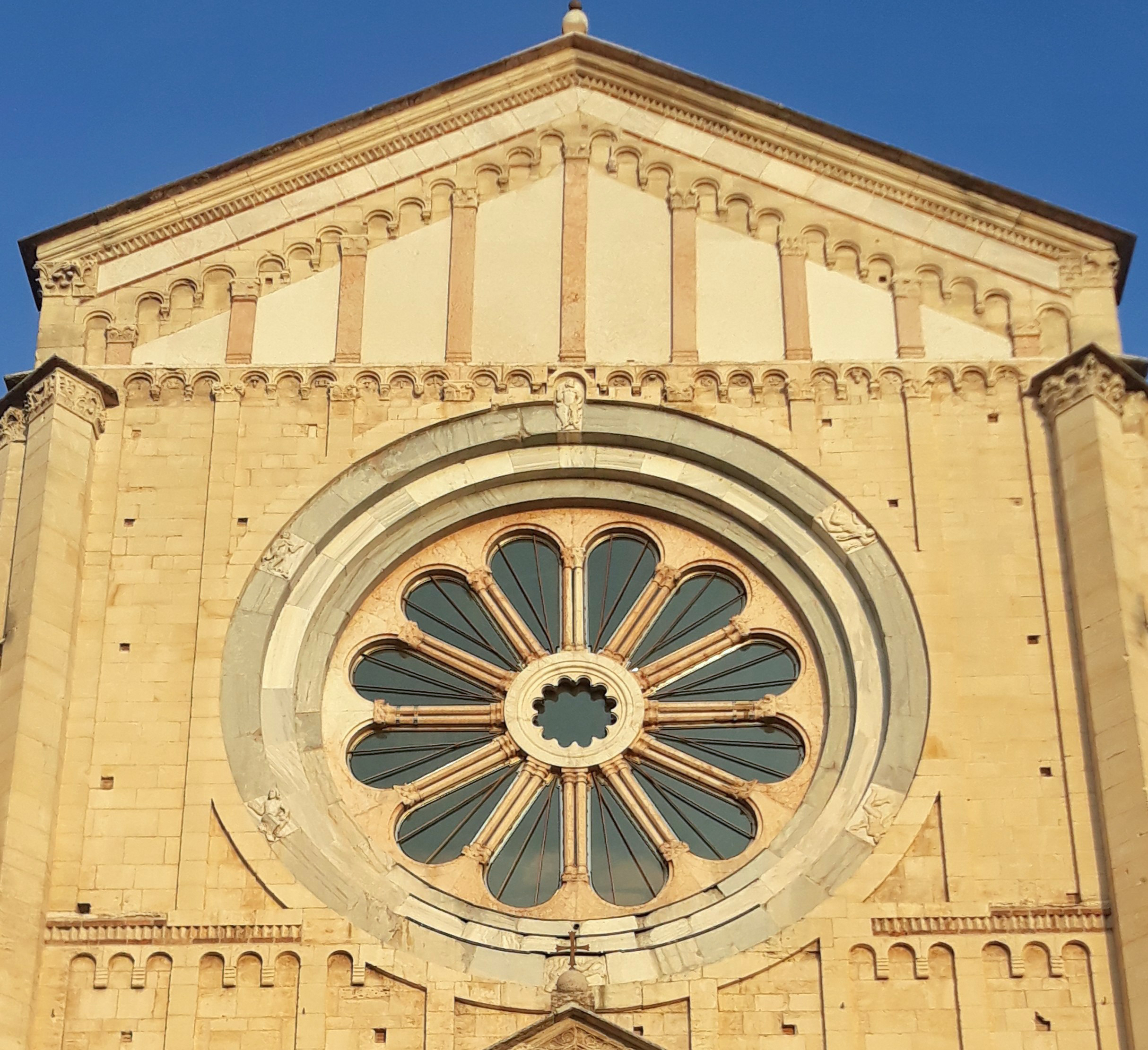 Basilica di san Zeno a Verona